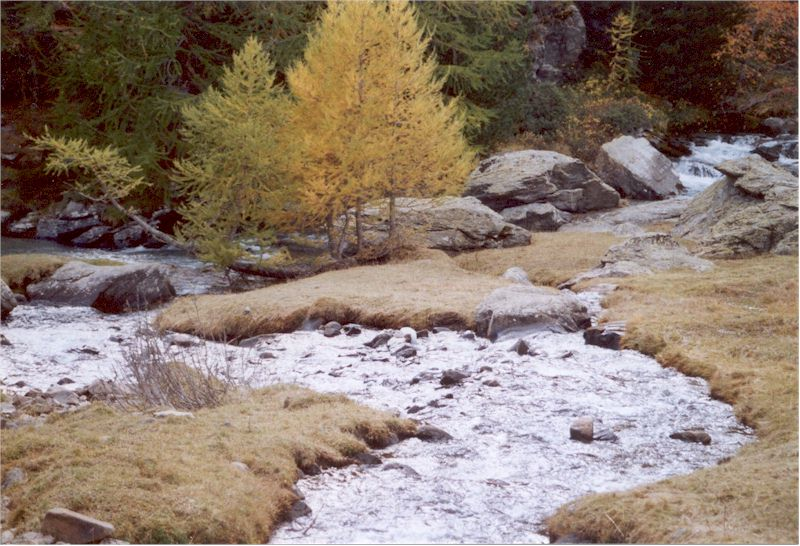 Le torrent de la Cula, se jette dans la Clarée